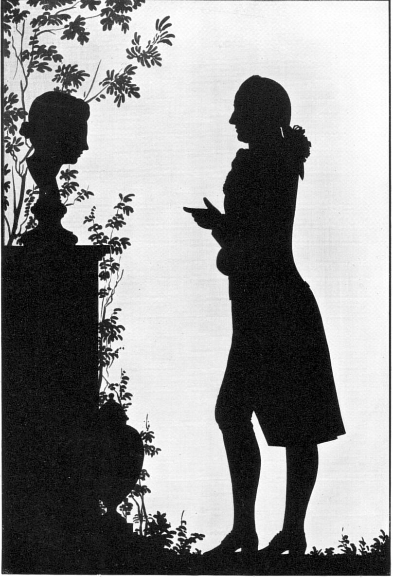 Goethe vor einem Grabmal mit weiblicher Büste. Einer dr schönsten Silhouetten der Blütezeit dieser Kunst.